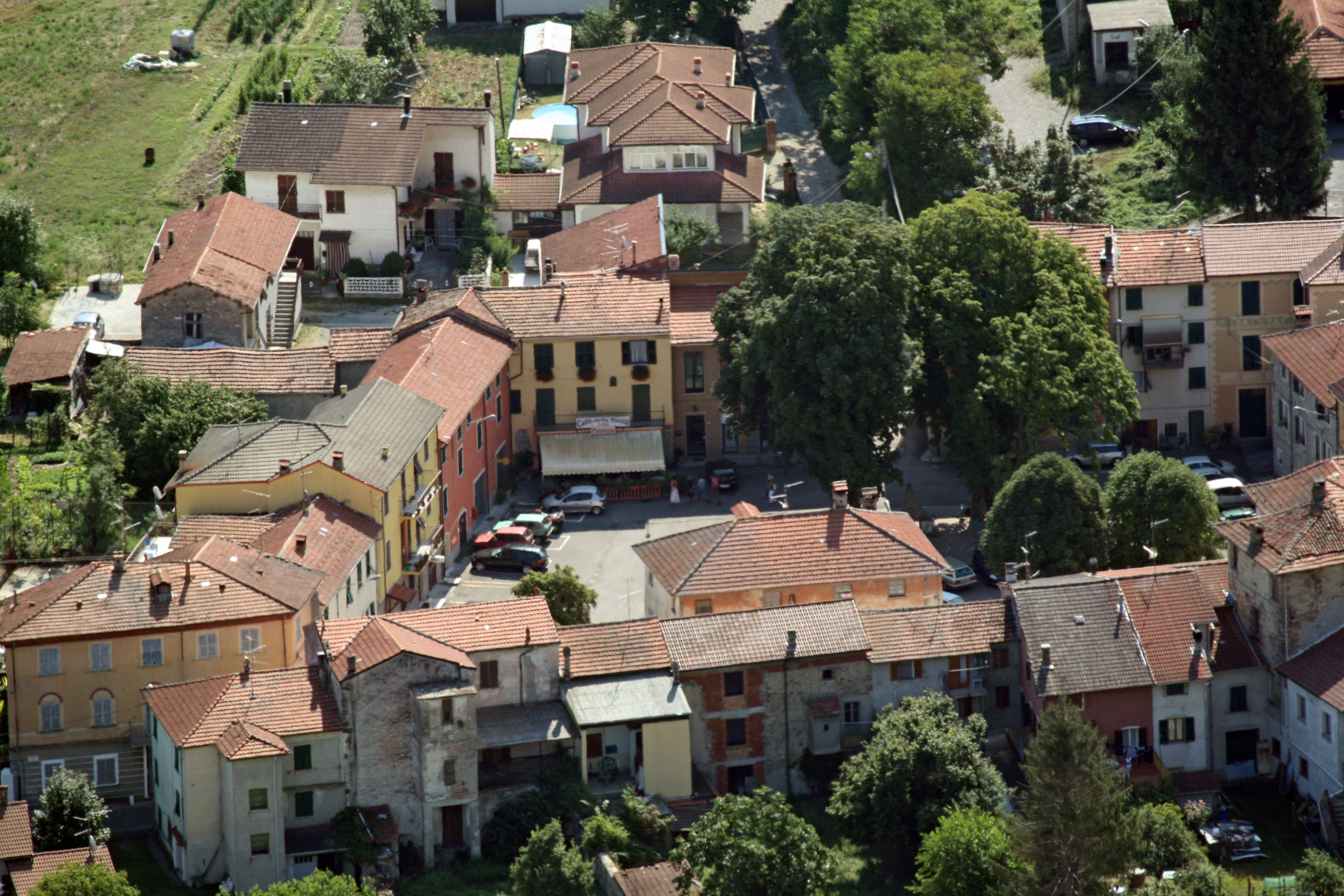 Piazza regina Margherita di Savoia a Rocchetta Ligure in val Borbera